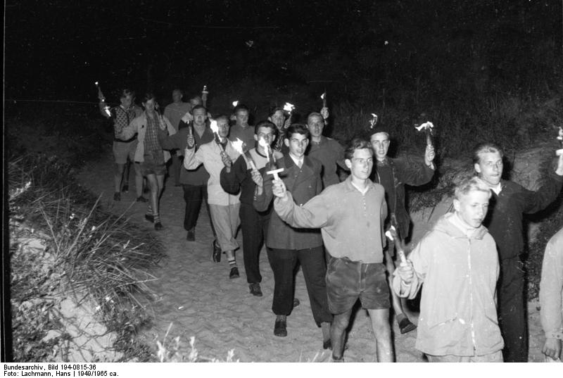 CVJM Ferienlager "Waterdelle" des Evangelischen Jungmännerwerkes Deutschlands